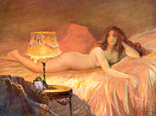 Eveil